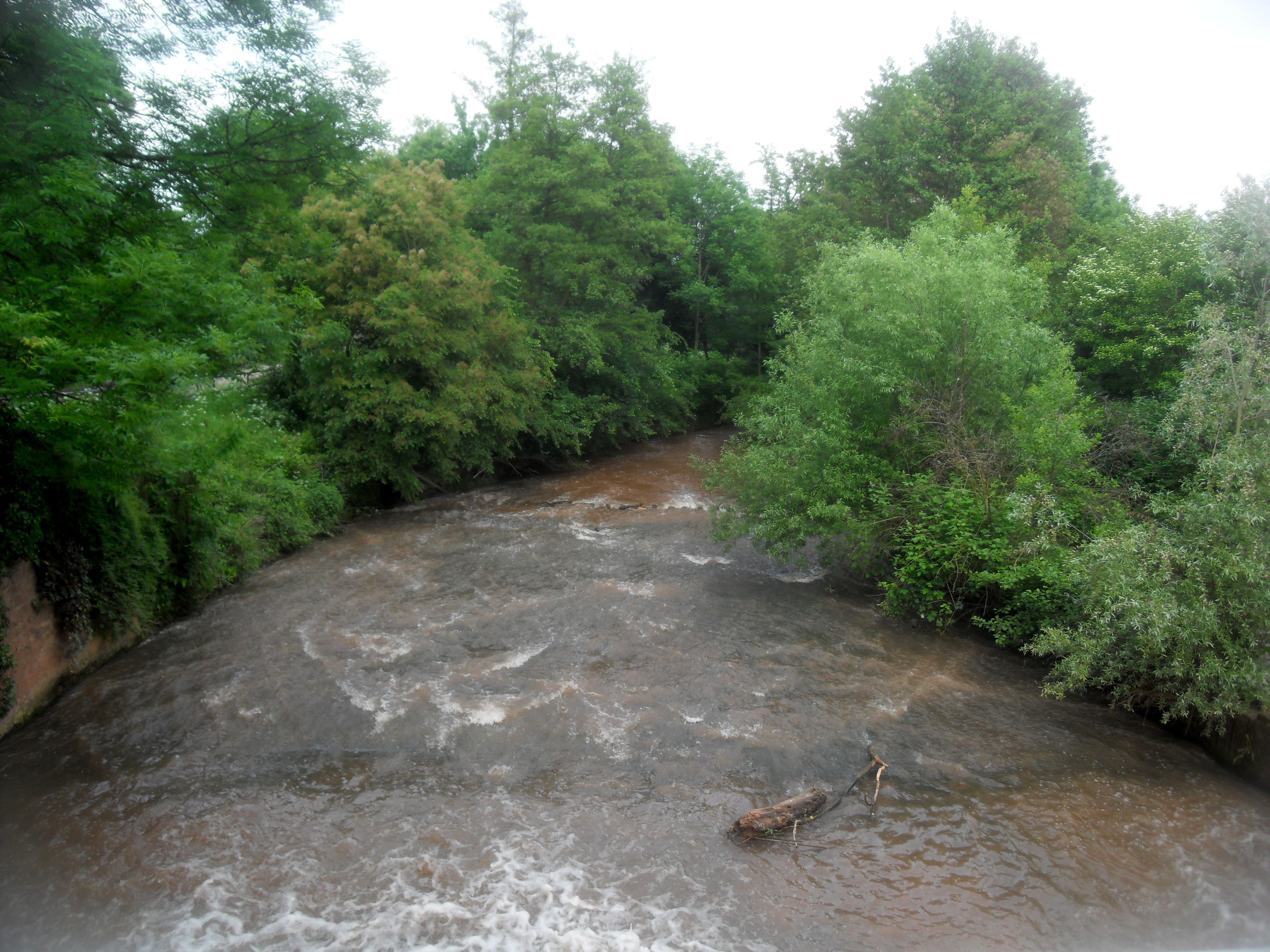 Die Pfrimm im Wormser Karl-Bittel-Park in Rheinhessen in Rheinland-Pfalz (Deutschland)